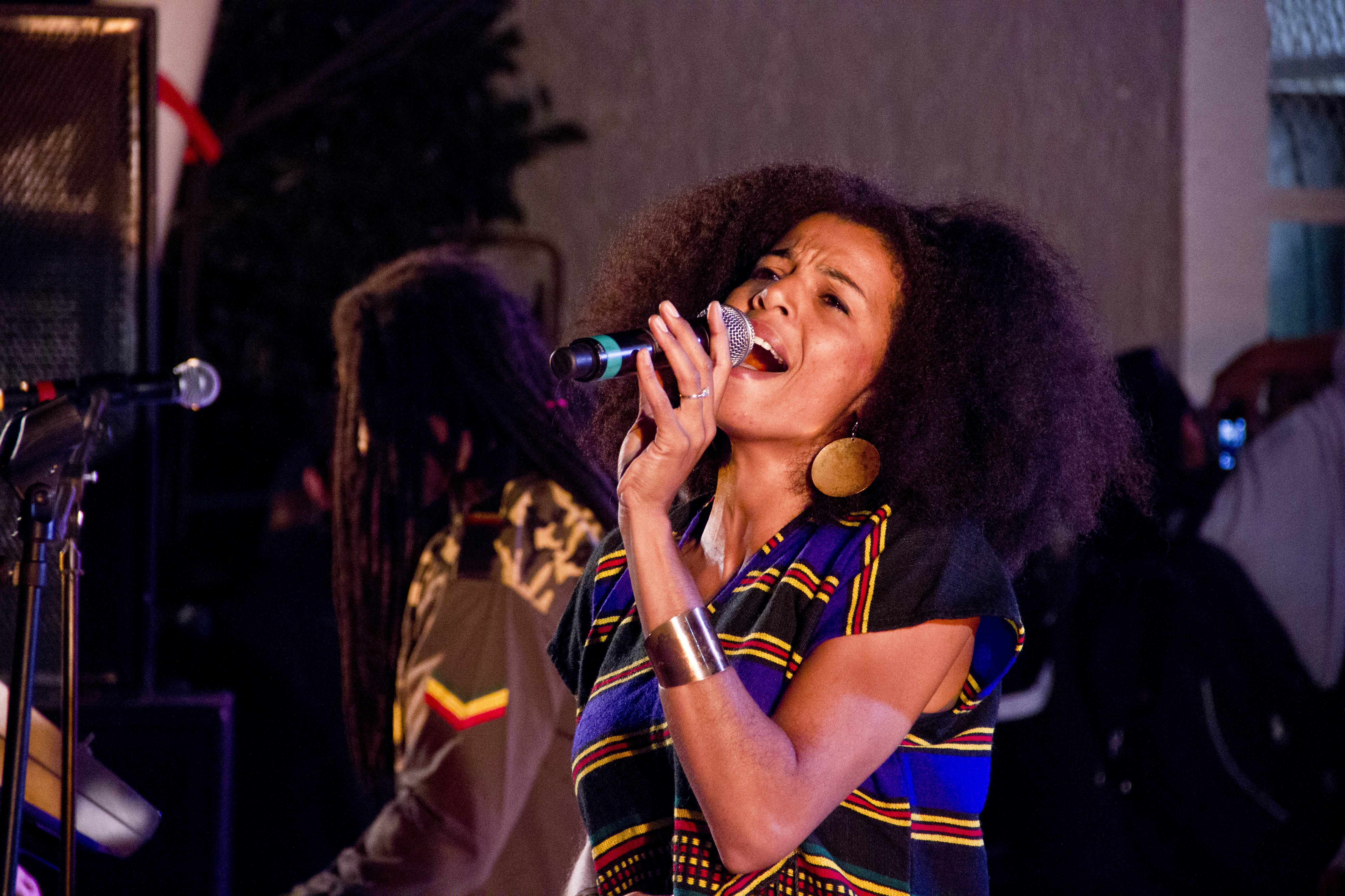 Mamadee at Un Canto Por Africa festival (24 March 2012) Alameda Poniente Santa Fé, Ciudad de México